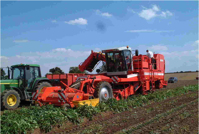 Mesin pemanen kentang